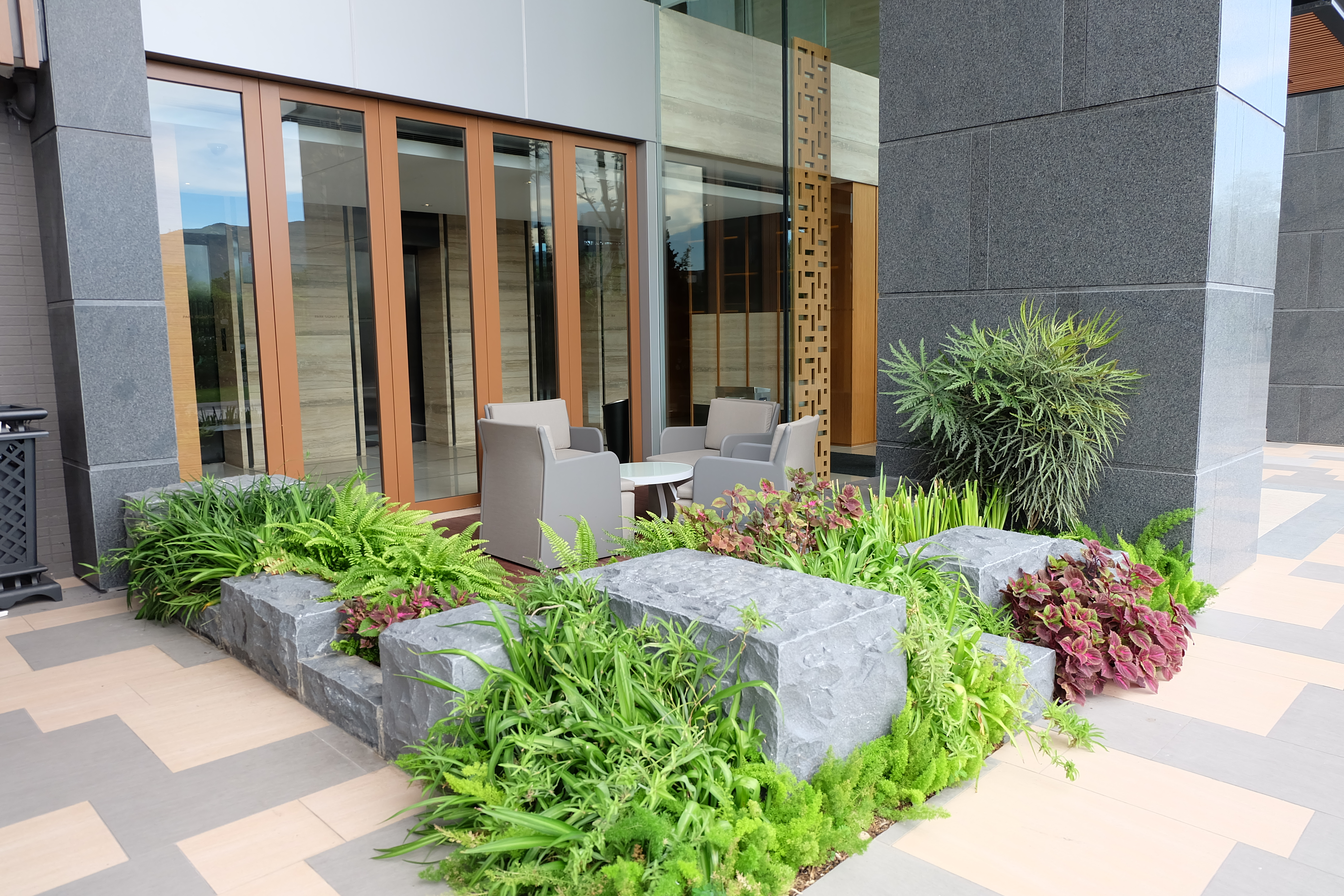 中文（香港）: 溱柏屋苑內綠化休憩空間